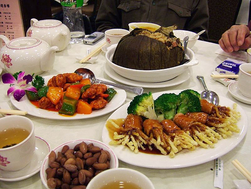 Buddhist cuisine vegetarian